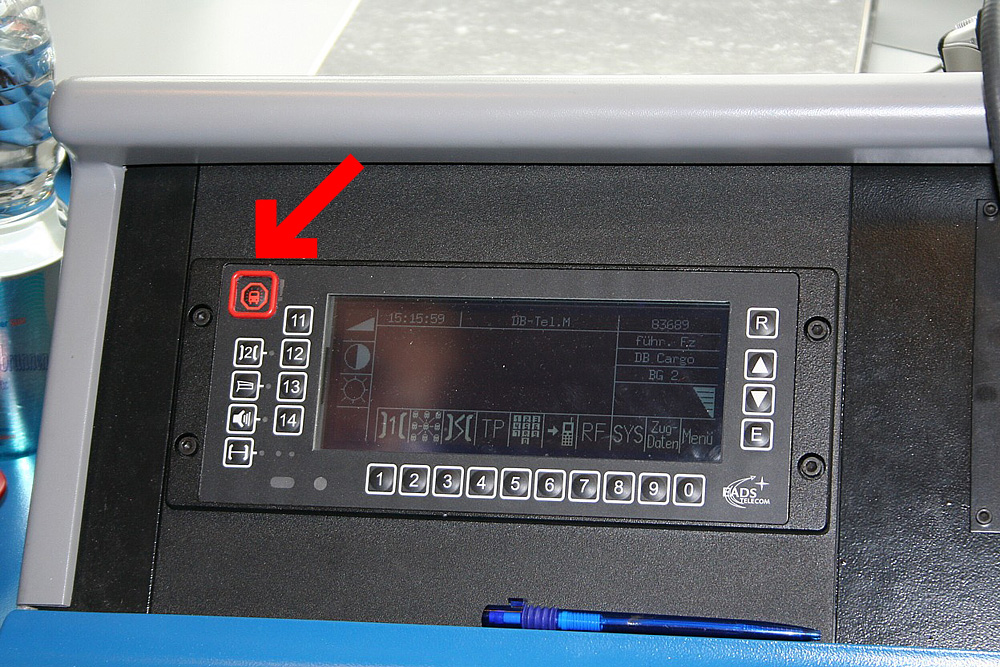 Notruftaste eines Zugfunkgeräts